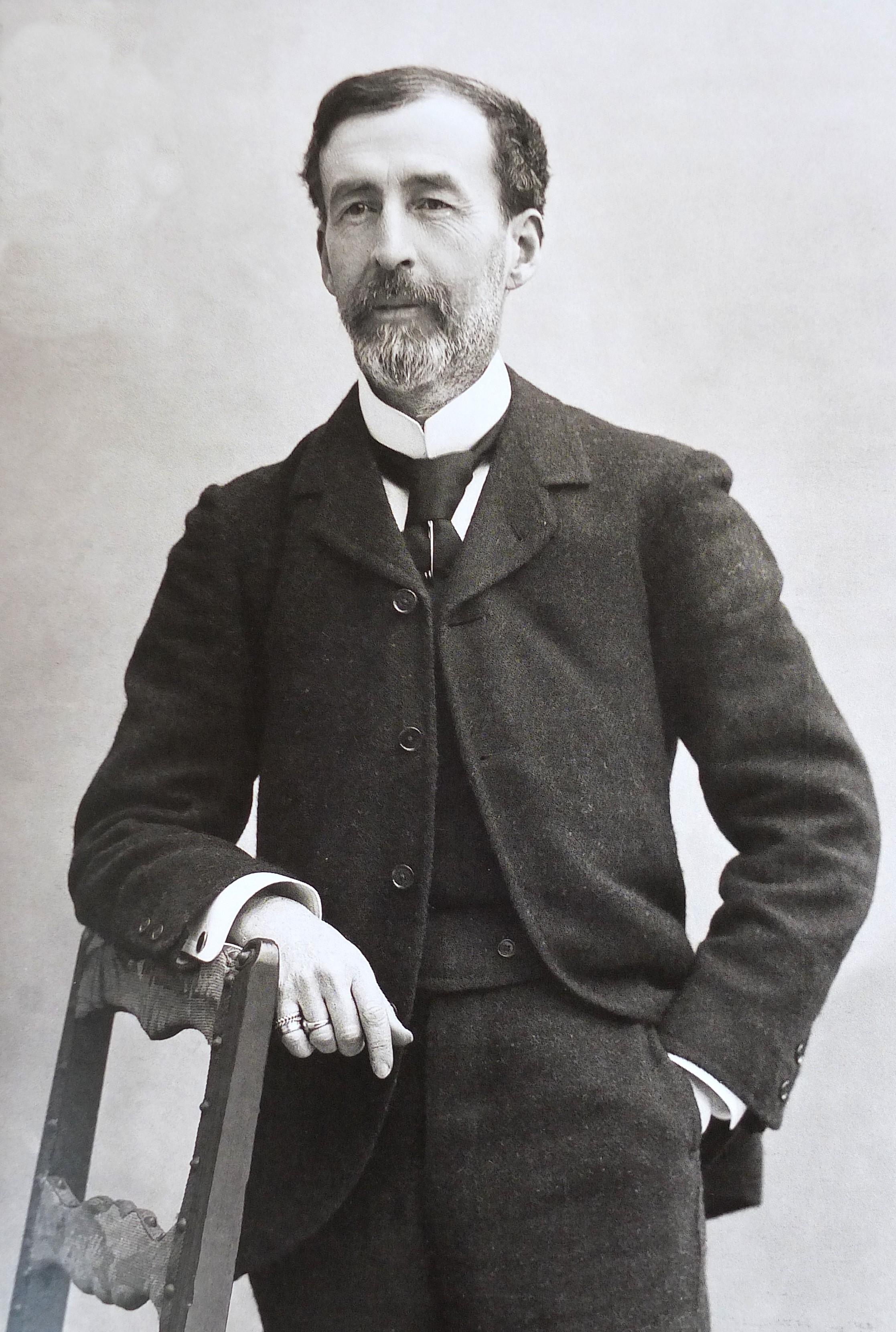 José-Maria de Heredia, photographié par Paul Nadar le 25 février 1896.